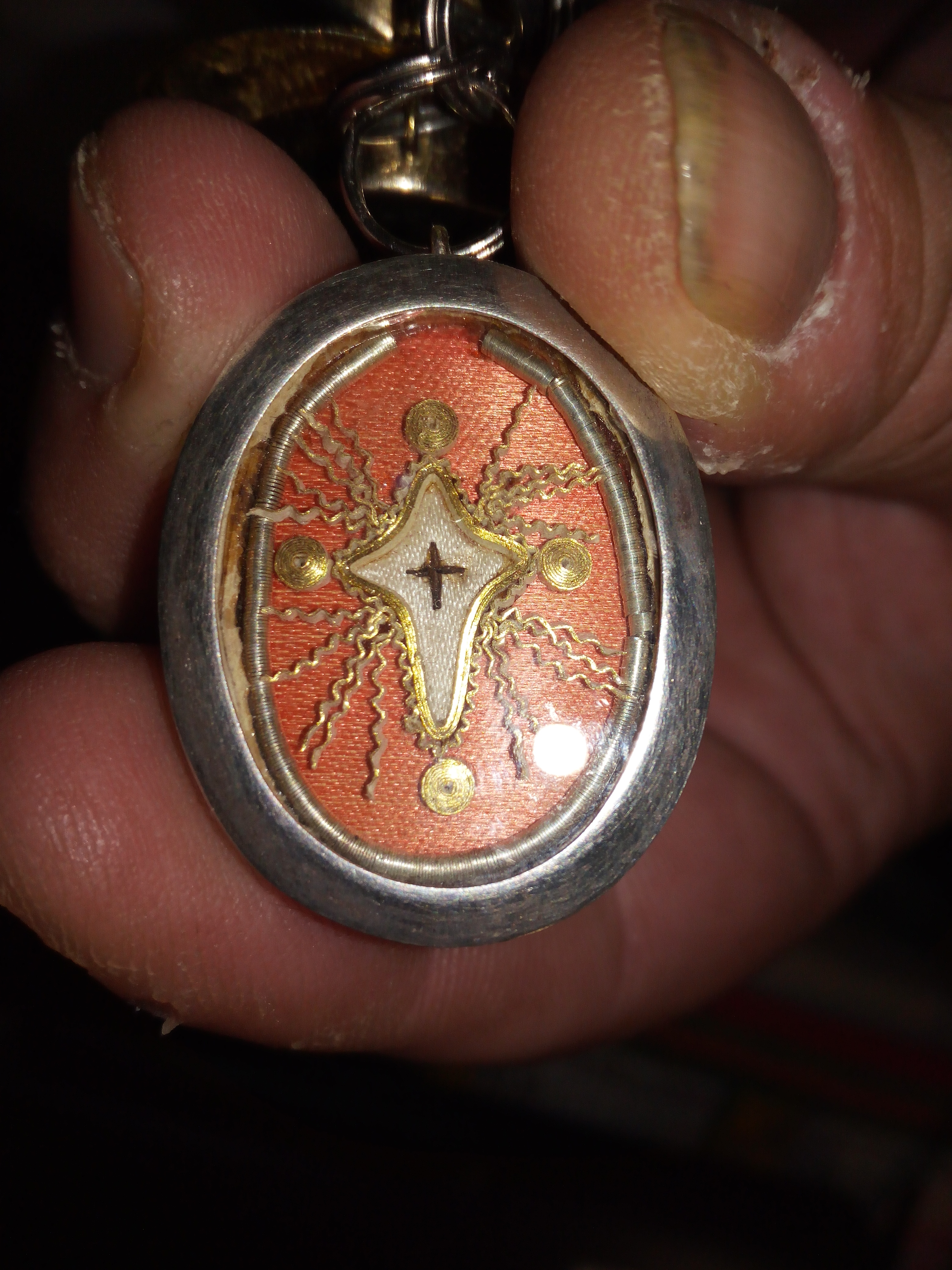 Santa Croce